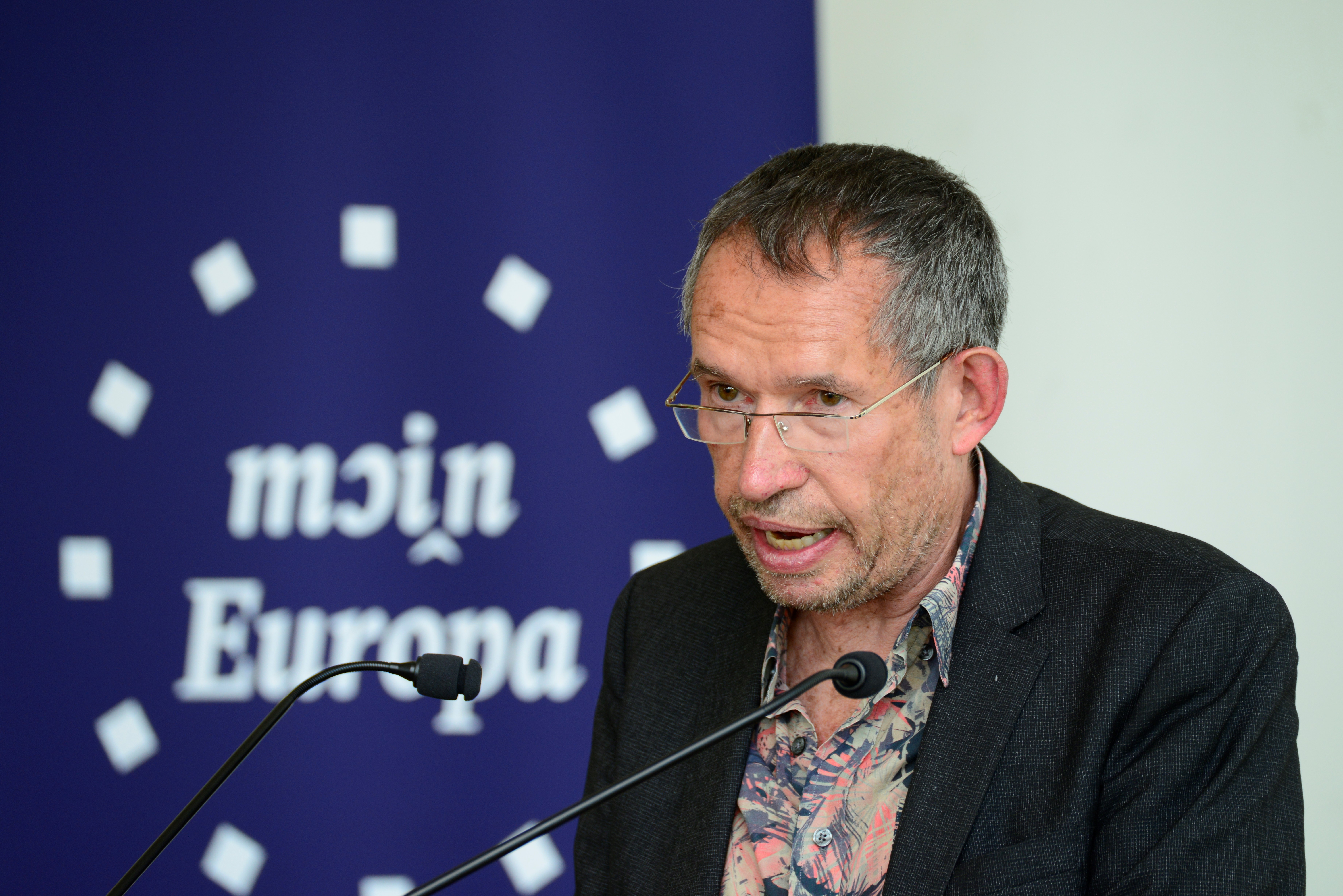 Der Schriftsteller Carsten Jensen bei seiner Festrede zur Verleihung des Europapreises der EUF - gestiftet vom Hochschulrat.